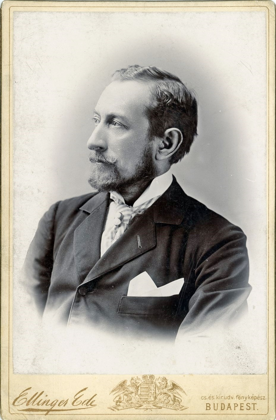 Bartók Lajos költő, drámaíró, szerkesztő